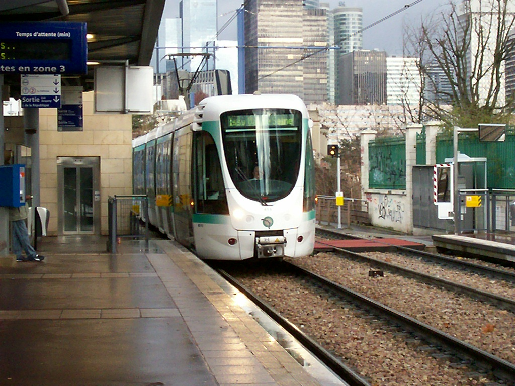 T2 à Puteaux